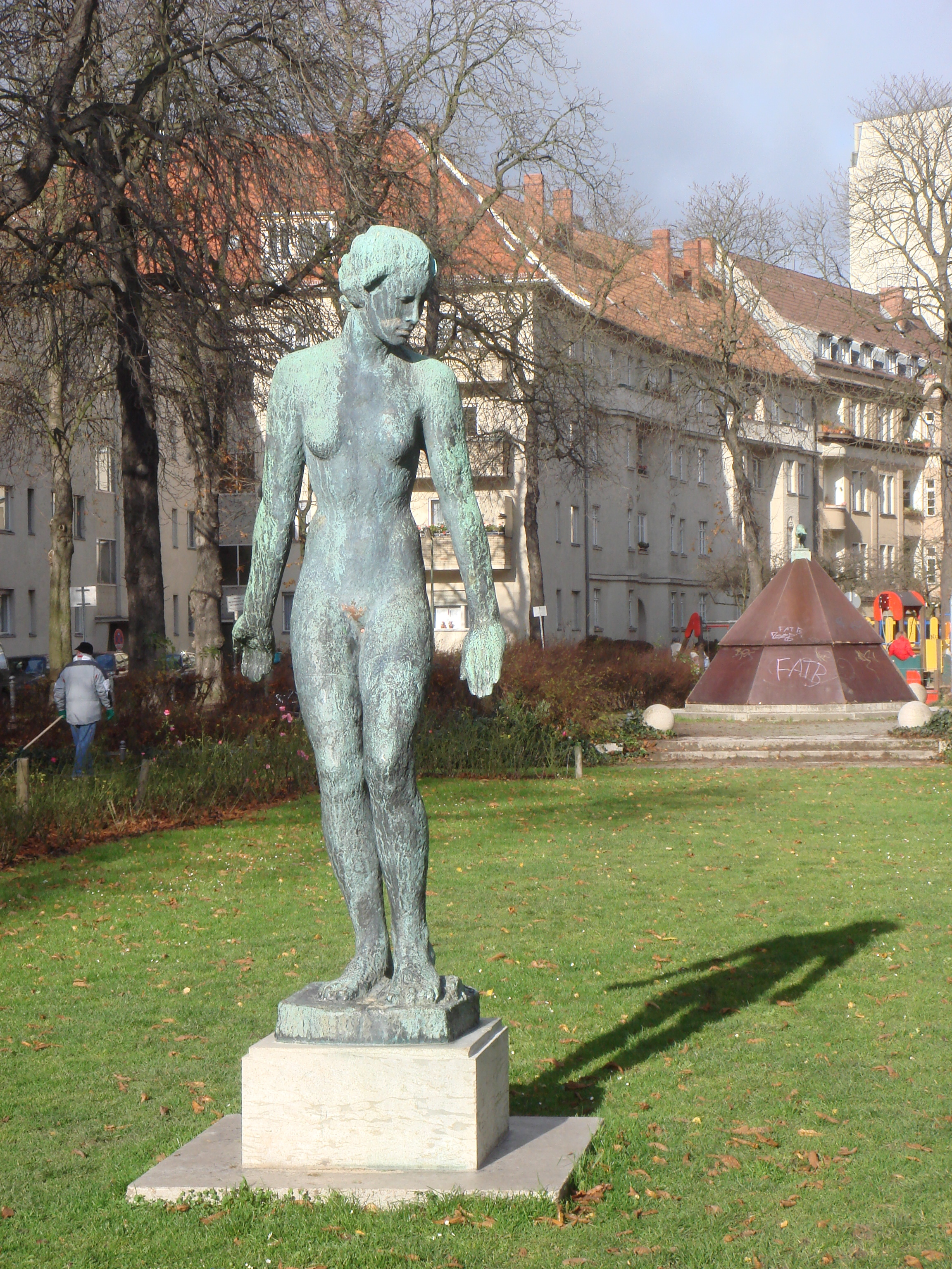 Kolbes "Der Abend" in den Ceciliengärten Berlin-Schöneberg/Germany Urheber: Emmridet